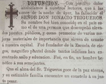 Álbum de Ignacio Triguero, Ma. Teresa Bermudez